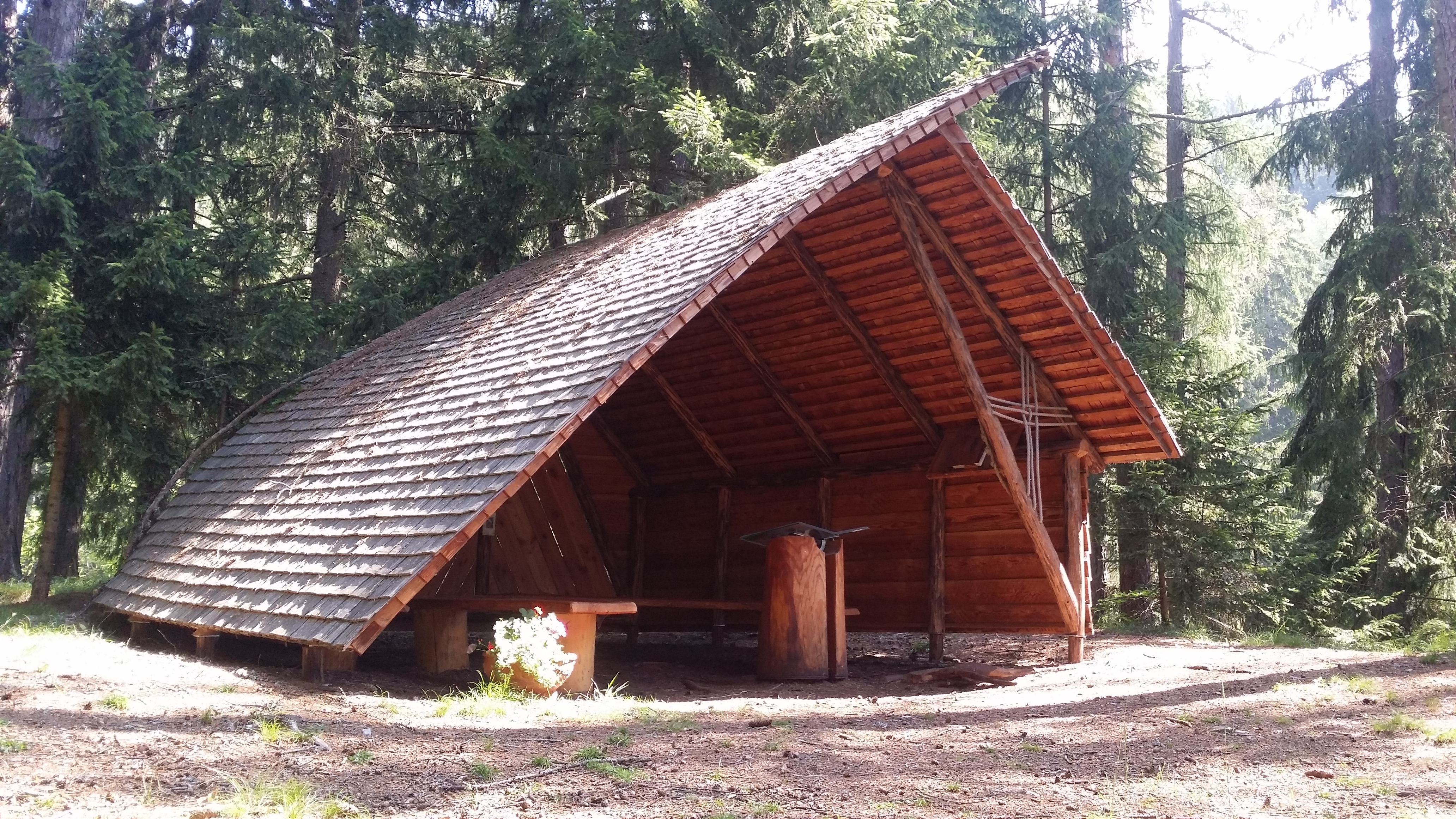 Rothenfelser Waldandachts-Hütte in Oberwölz